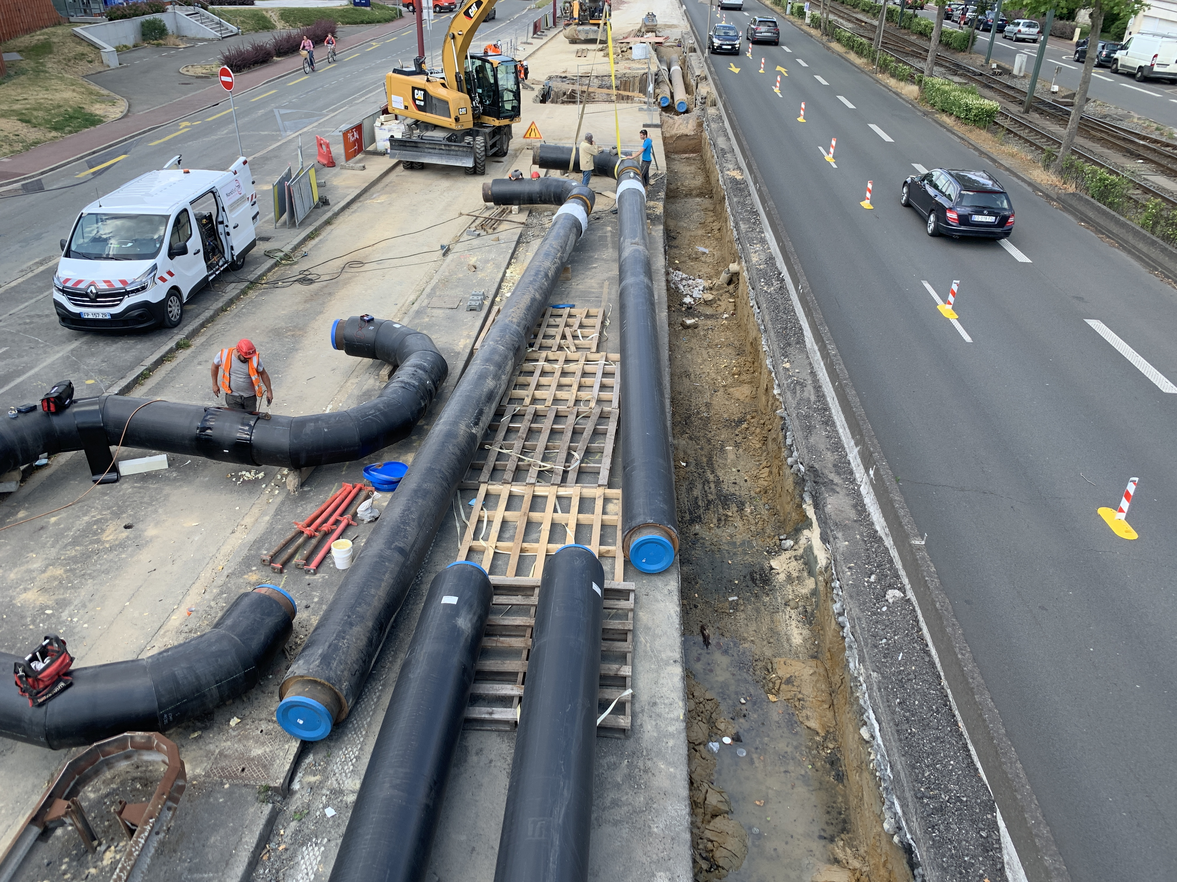 Chantier de chauffage urbain pour les habitants de la métropole européenne de Lille. Les tuyaux sont alimentés par un réseau d'eau chaude à 120°C venant du centre de valorisation énergétique d'Halluin.